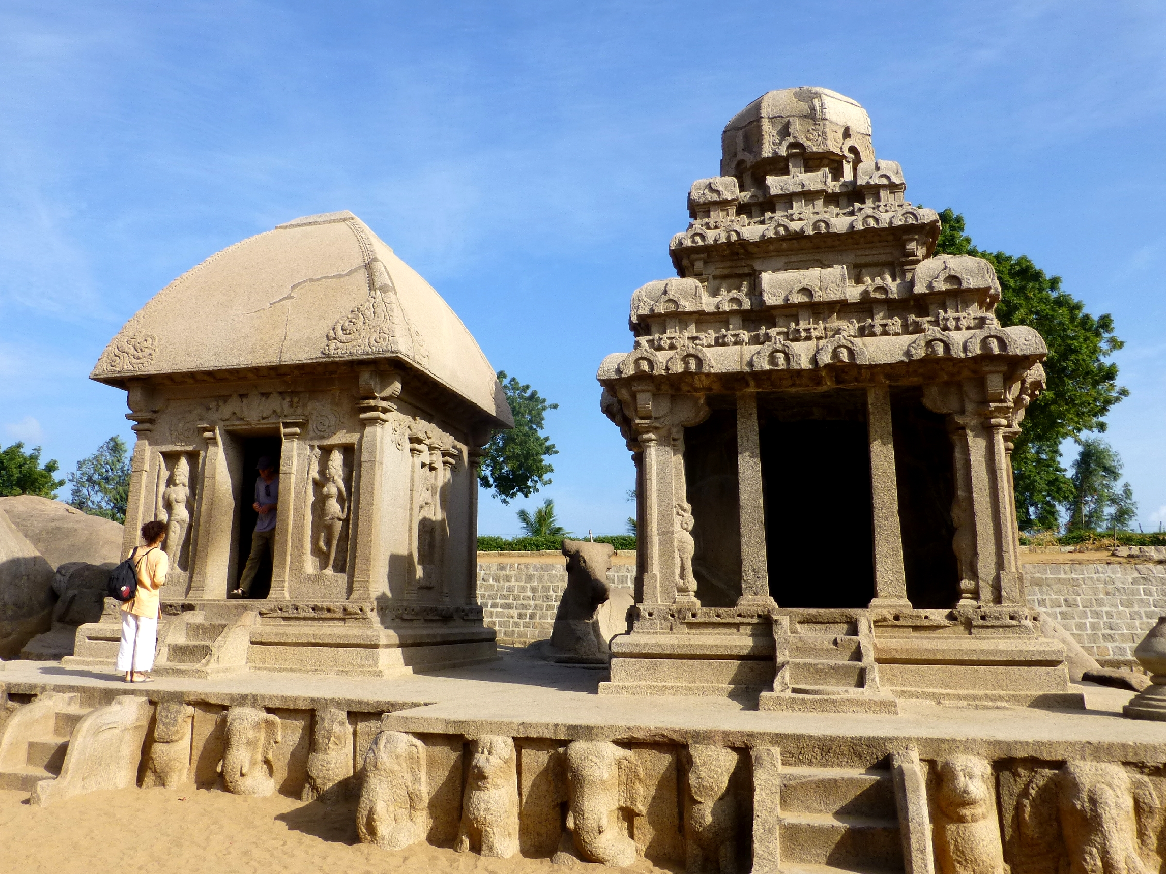 Draupadi Ratha Arjuna Ratha Pancha Rathas Mahabalipuram India